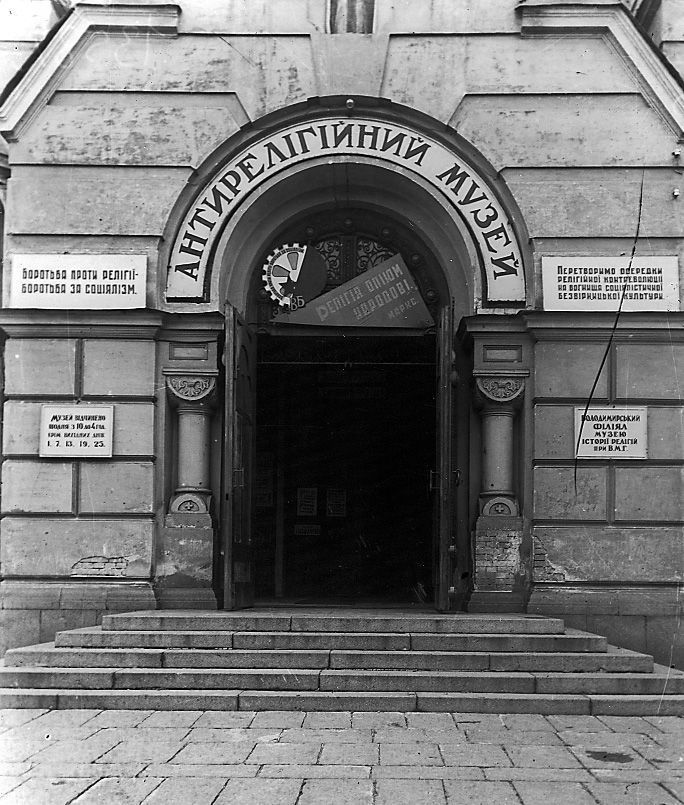 Володимирський собор як антирелігійний музей наприкінці 1920 років